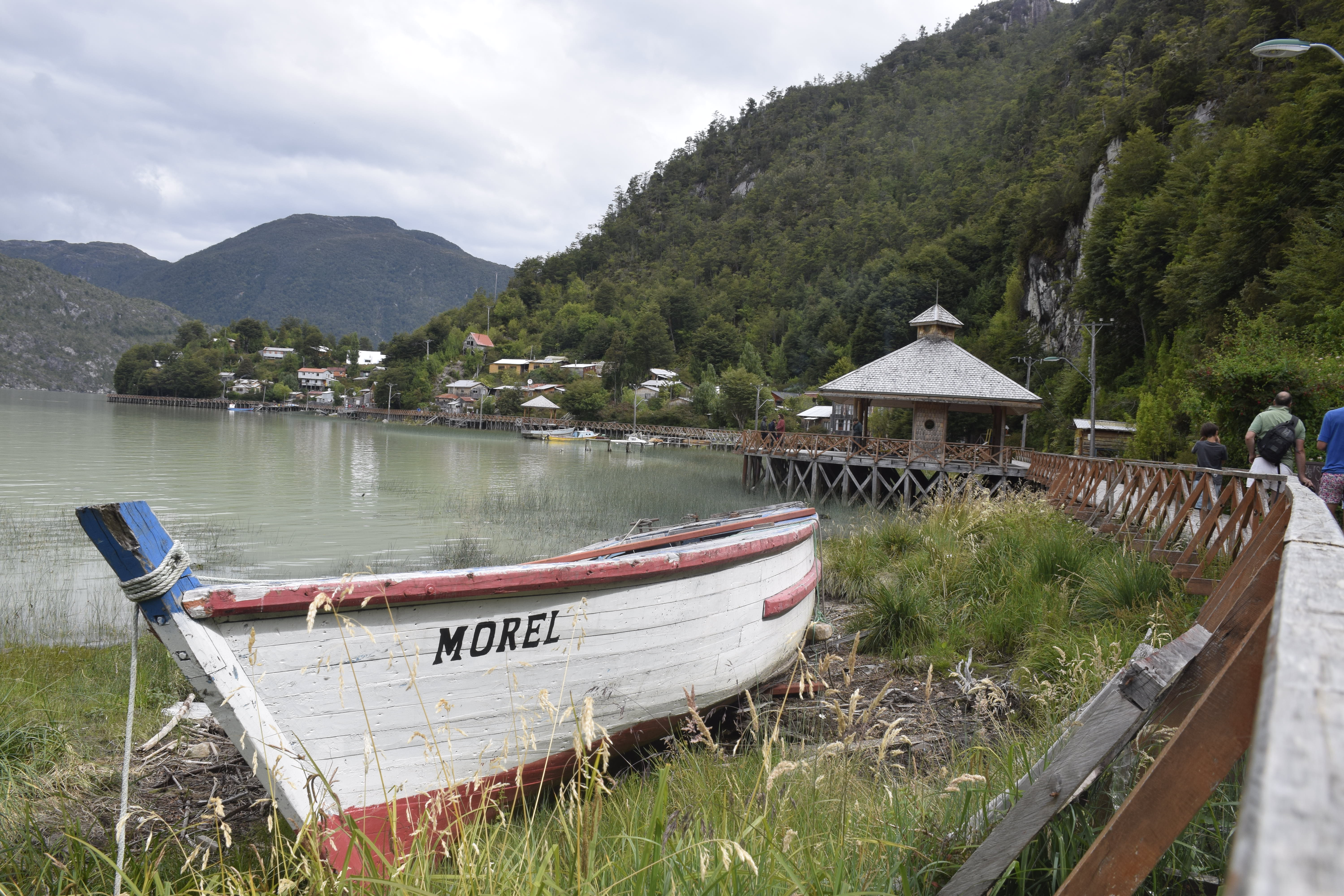 Pasarelas madera